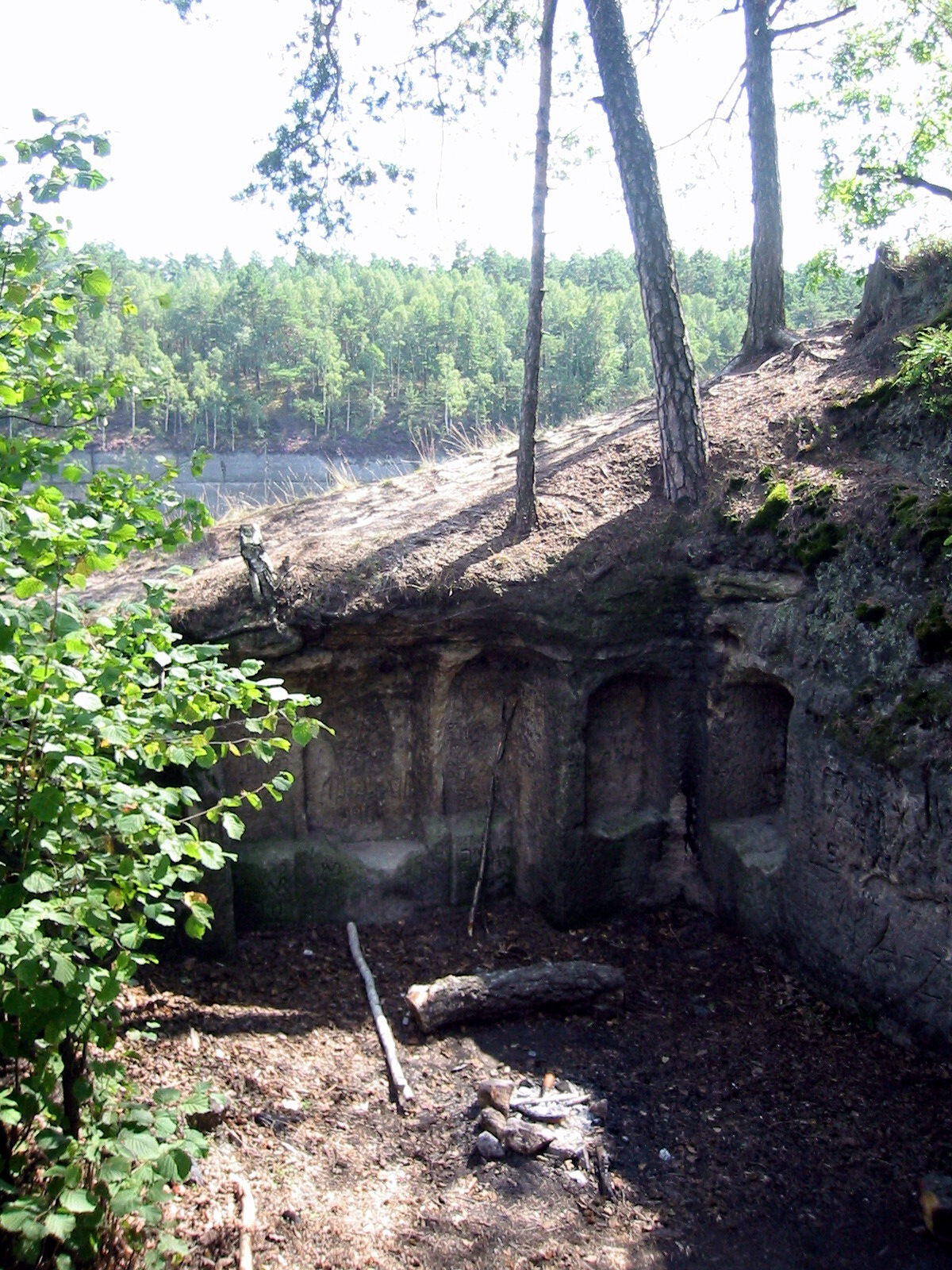 Felsenburg Stohánek, Struhanken, Plateau, Reste der Behausung, Nordböhmen, Tschechien